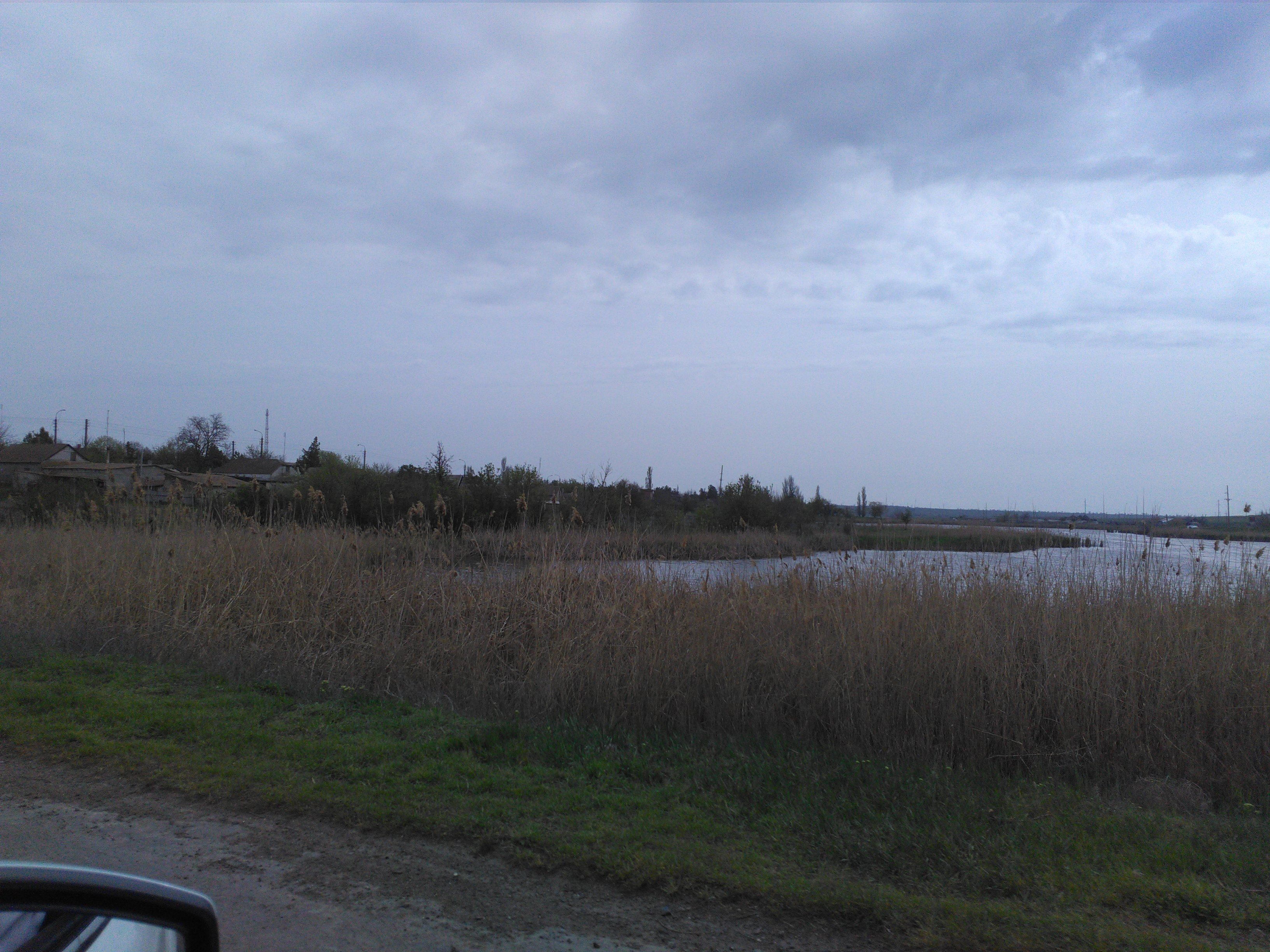 Село Кам'янка (Очаківський район), верхів'я лиману